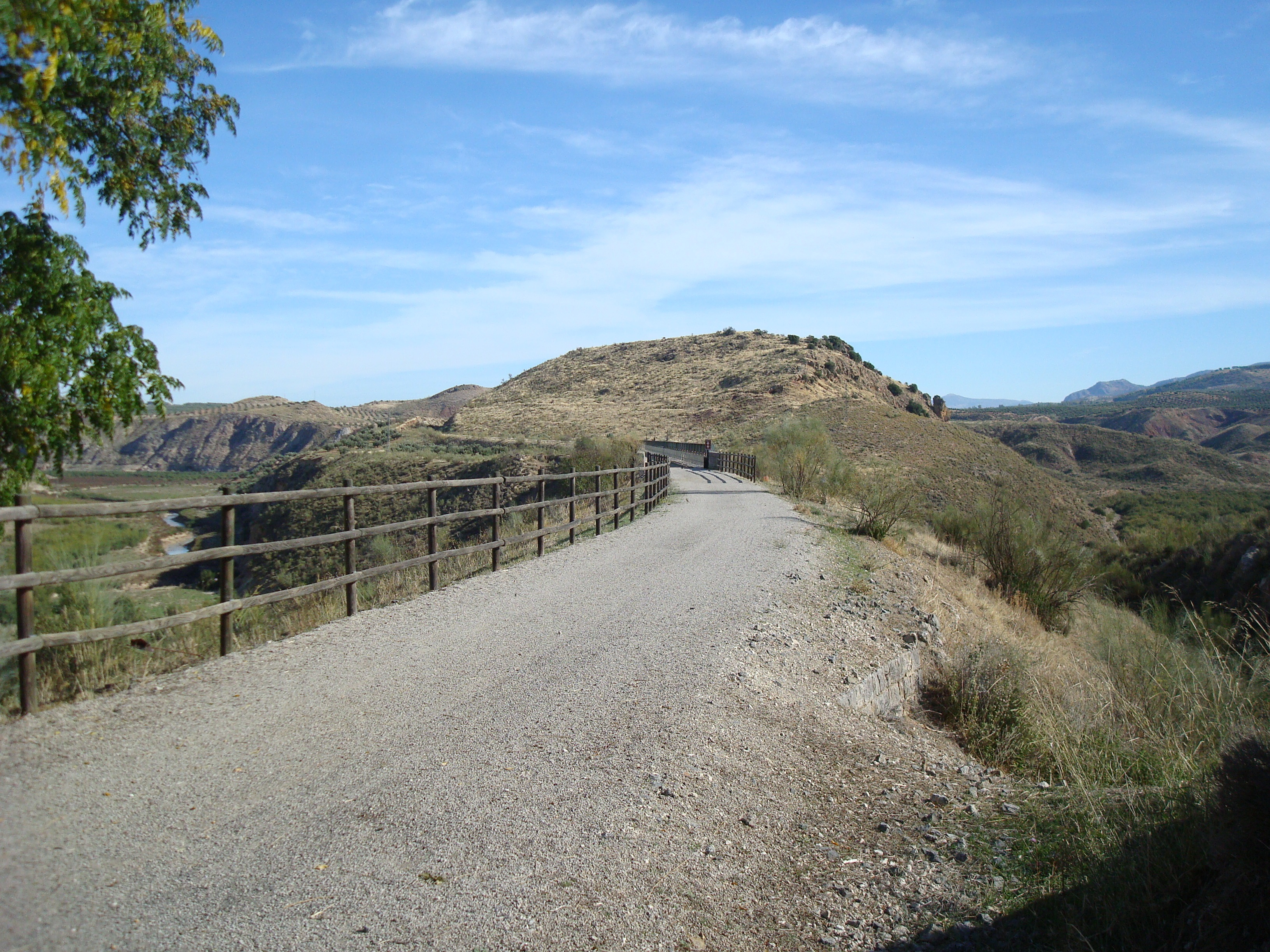 Subbética Cordobesa